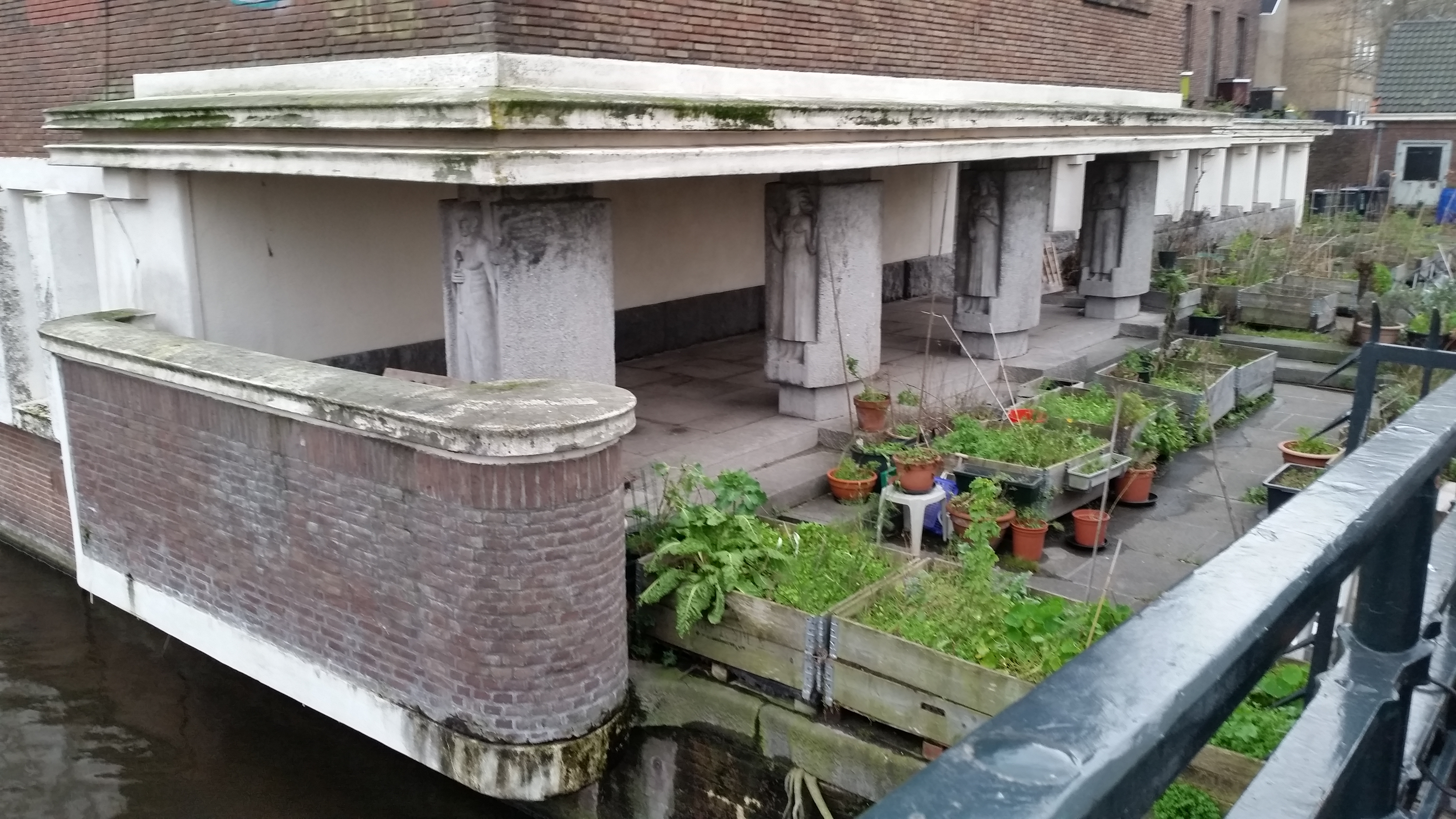 Beeldengalerij in het gebouw Arie Biemondstraat 101-113 in de gevel Nicolaas Beetsstraat